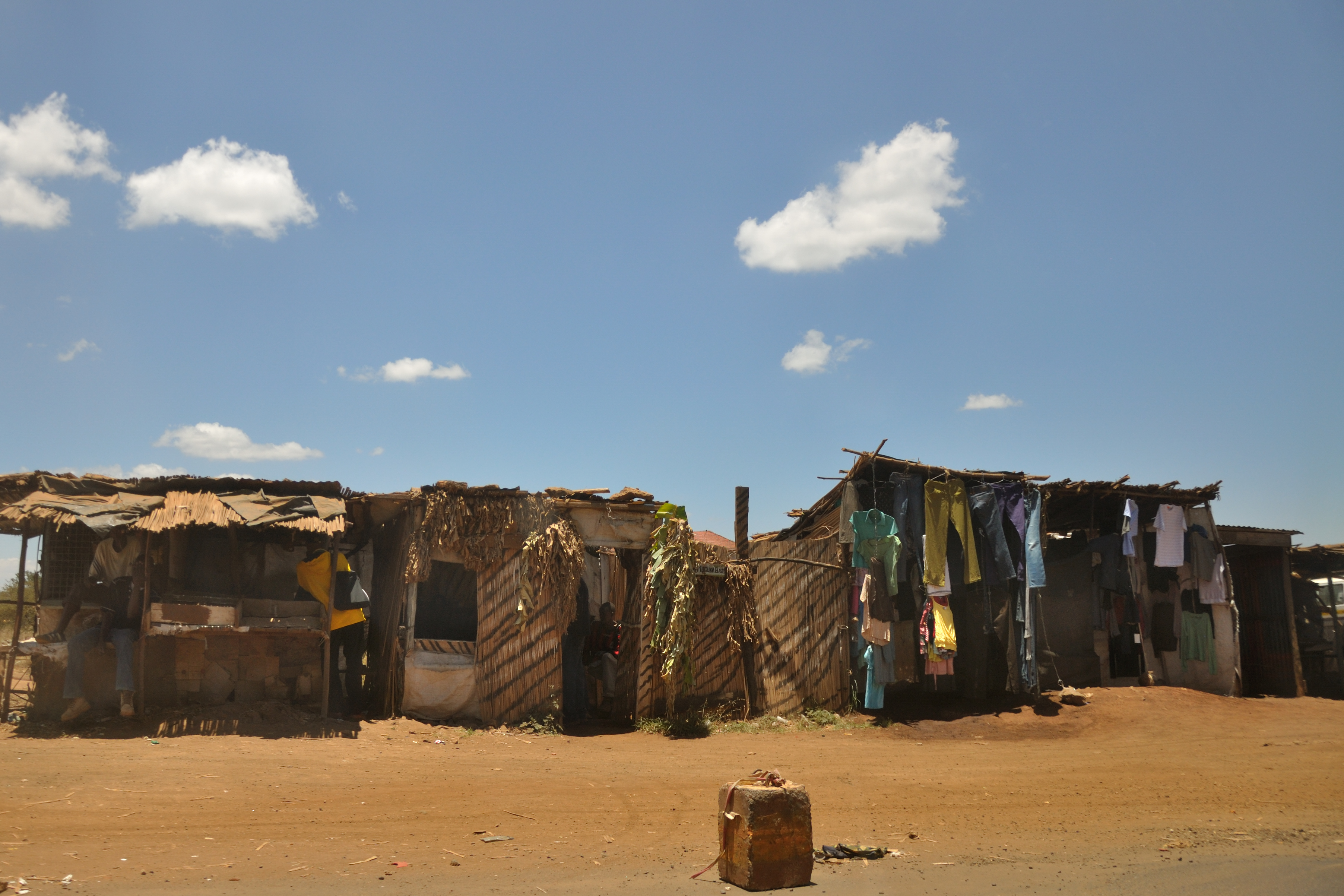 Kenya, roadside impressions from Kenya